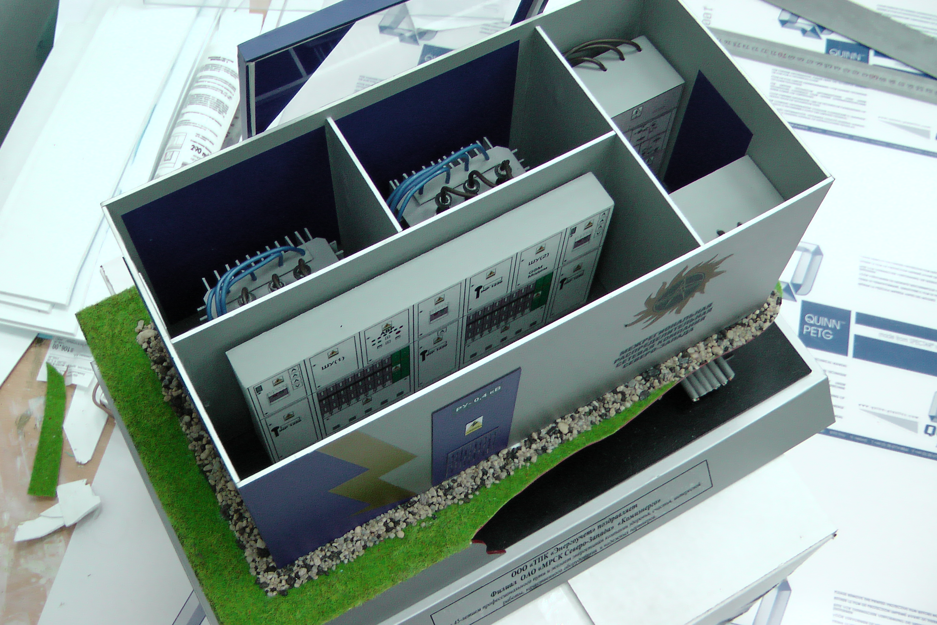 Интерьерный макет БКТП